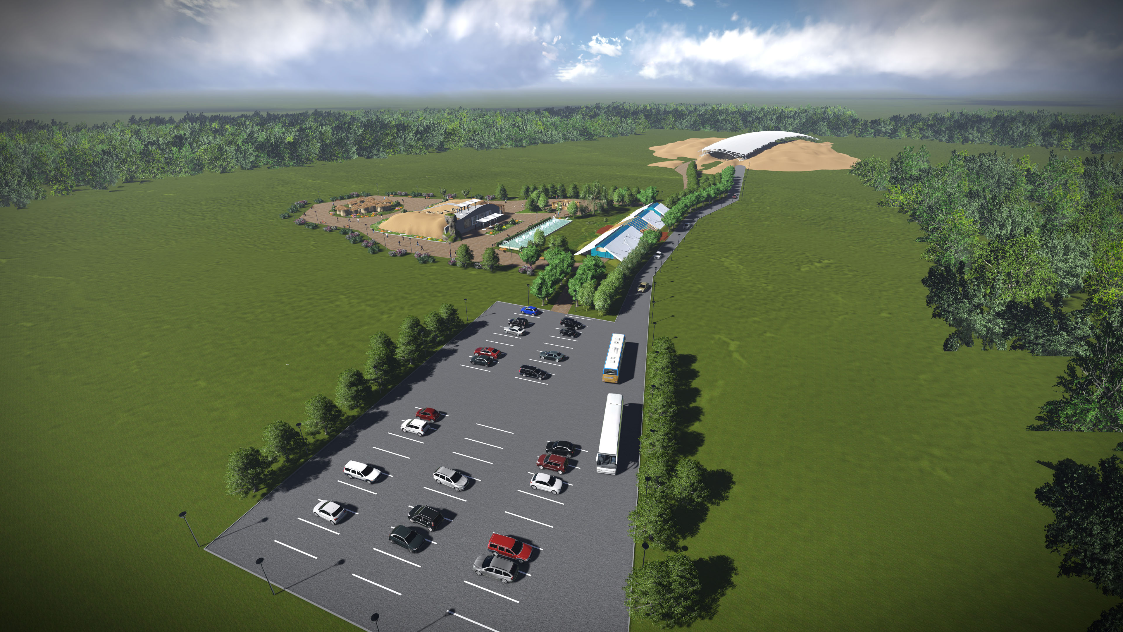 Arxeoloji Parkın konsepsiya layihəsi